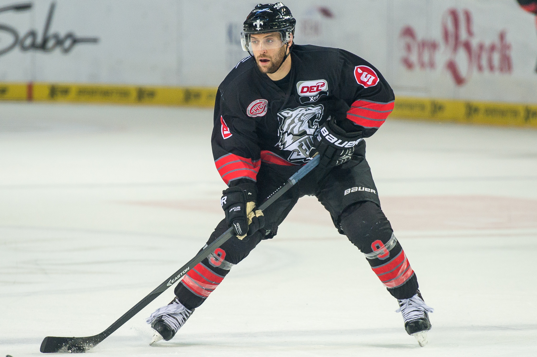 Arena Nürnberger Versicherungen,DEL,Eishockey,Evan Kaufmann,Thomas Sabo Ice Tigers Nürnberg